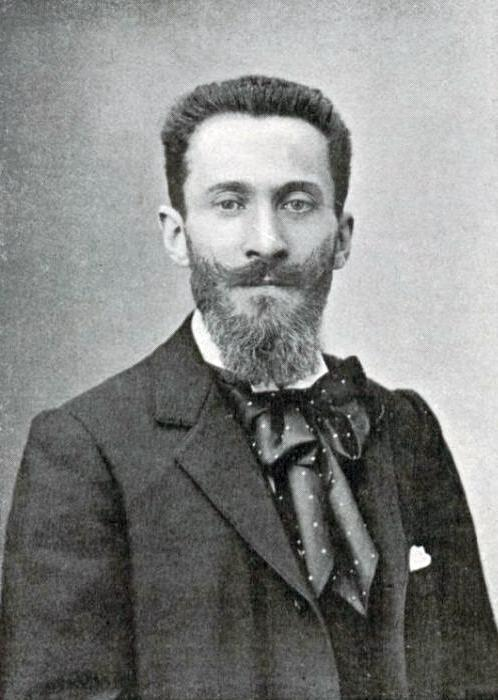 M. Escudier, avocat à la Cours d'Appel, devient Président de l'U.S.F.S.A. en 1899, à la place du vicomte de Janzé.